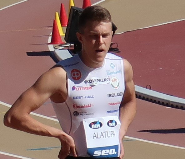 Konsta Alatupa 200 metrin juoksun alkueränsä jälkeen Kalevan kisoissa 2020.